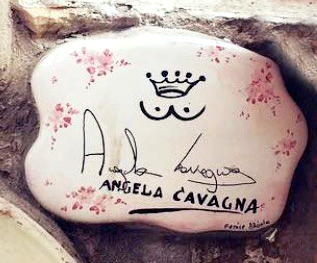 Ceramica con firma sul "Muretto di Alassio"